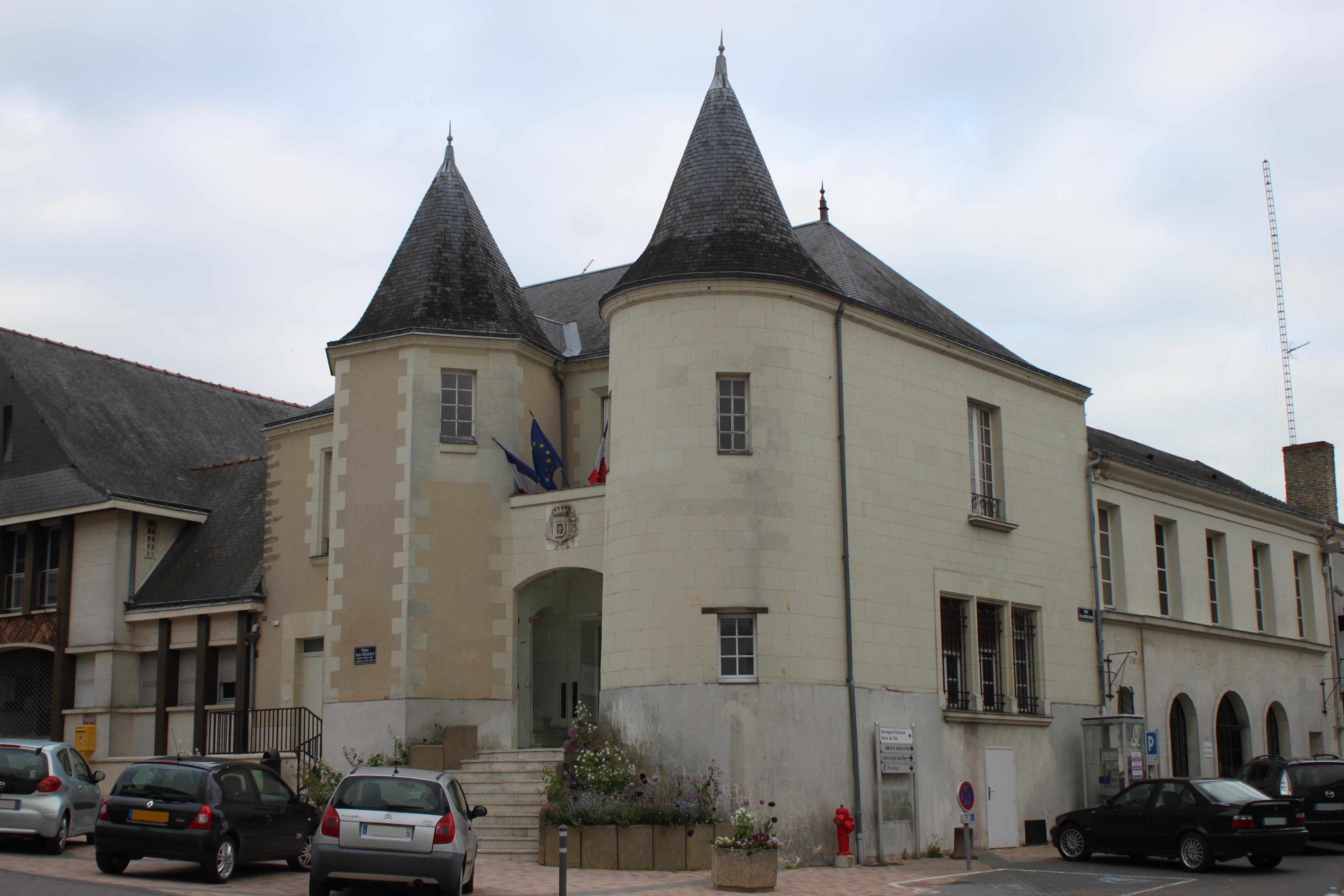 Mairie, Fr-49-Doué-la-Fontaine.